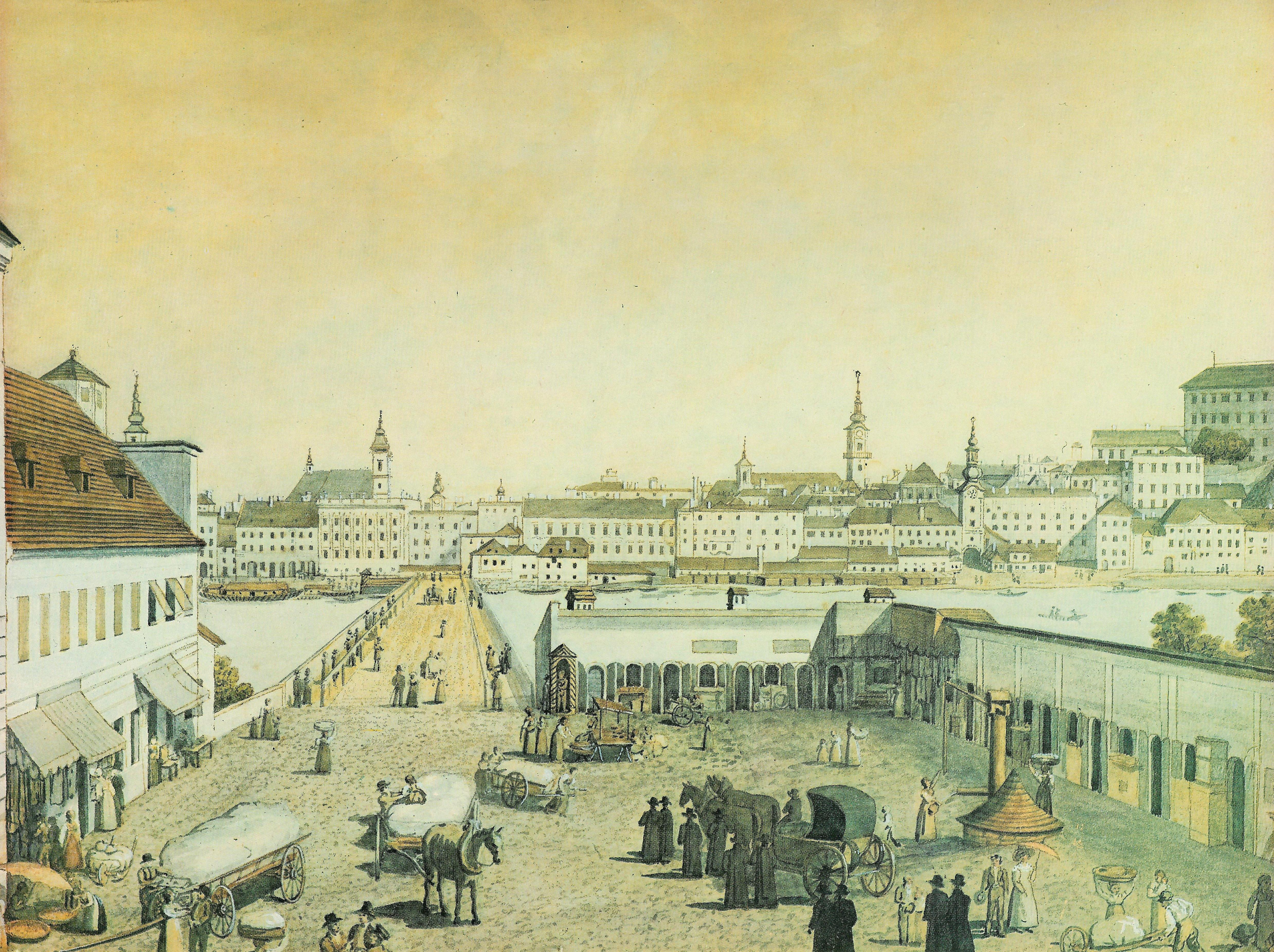 Linz vom Urfahrer "Platzl" aus